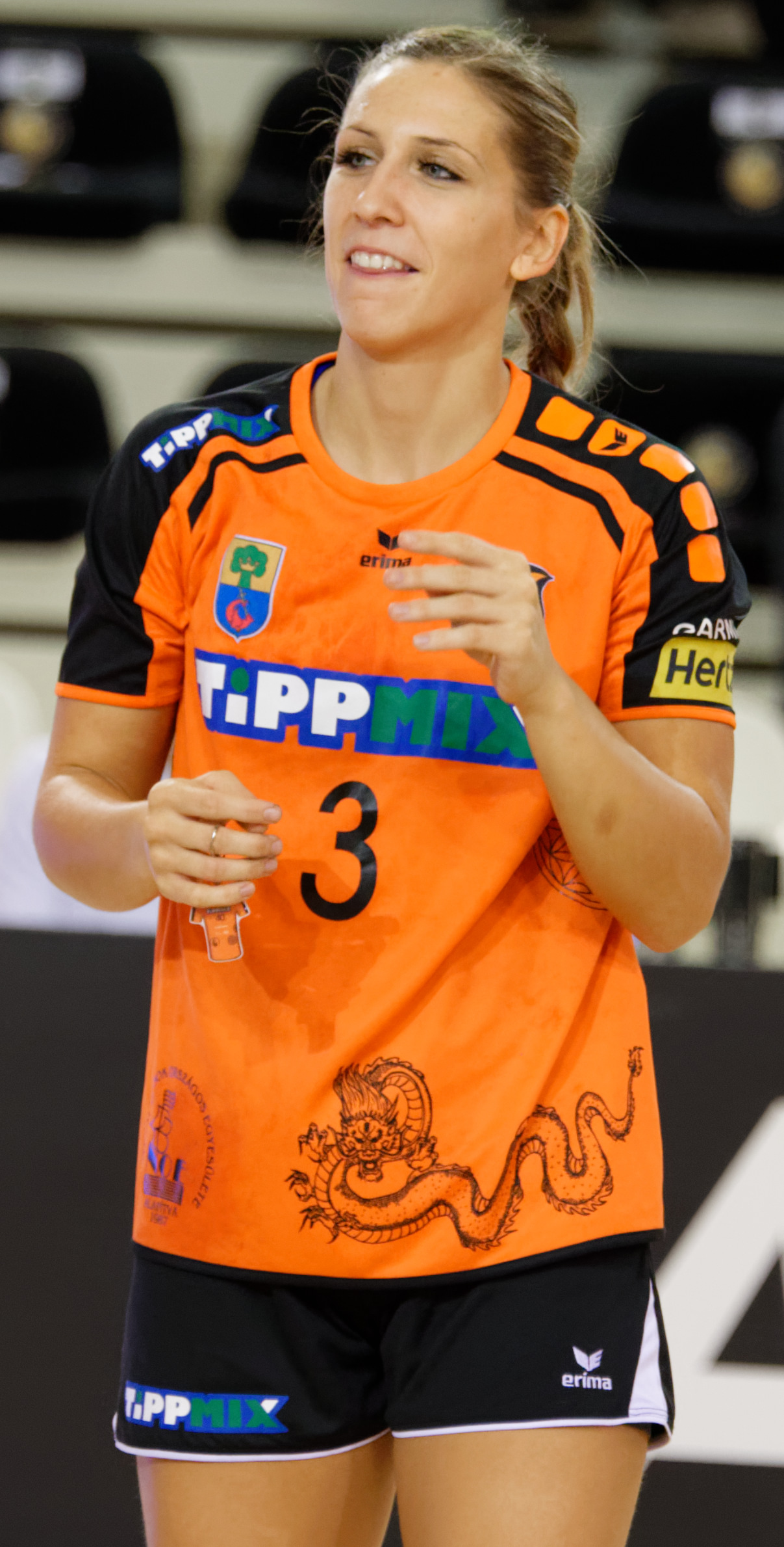 Rencontre retour du 3e tour de la coupe EHF, Issy Paris Hand / Erd. A Issy Les Moulineaux, le 18 novembre 2017.